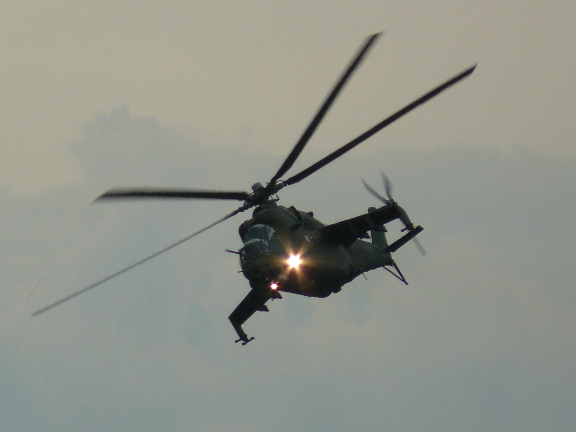 Mi-24 w czasie lotu pokazowego na festynie lotniczym w Łososinie Dolnej w 2016 roku.